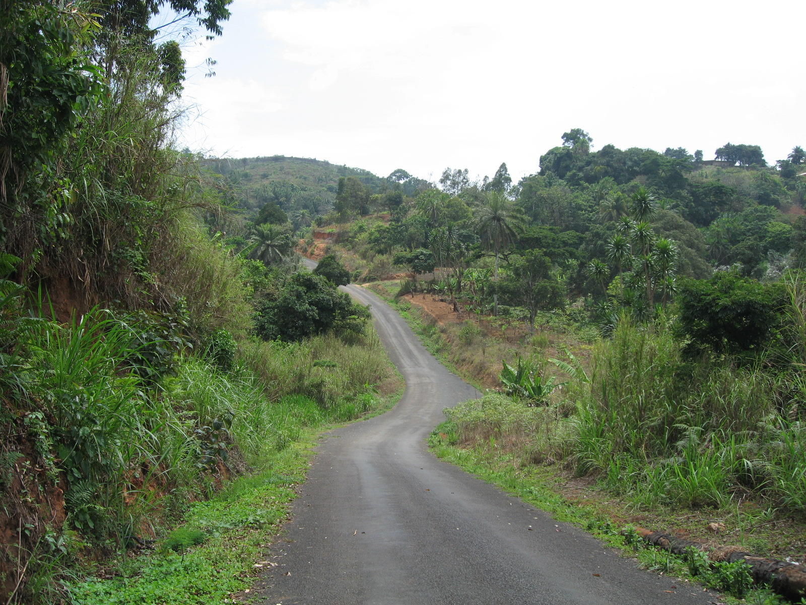 Road between Bana an Bafang, Cameroon/Route entre Bana et Bafang au Cameroun